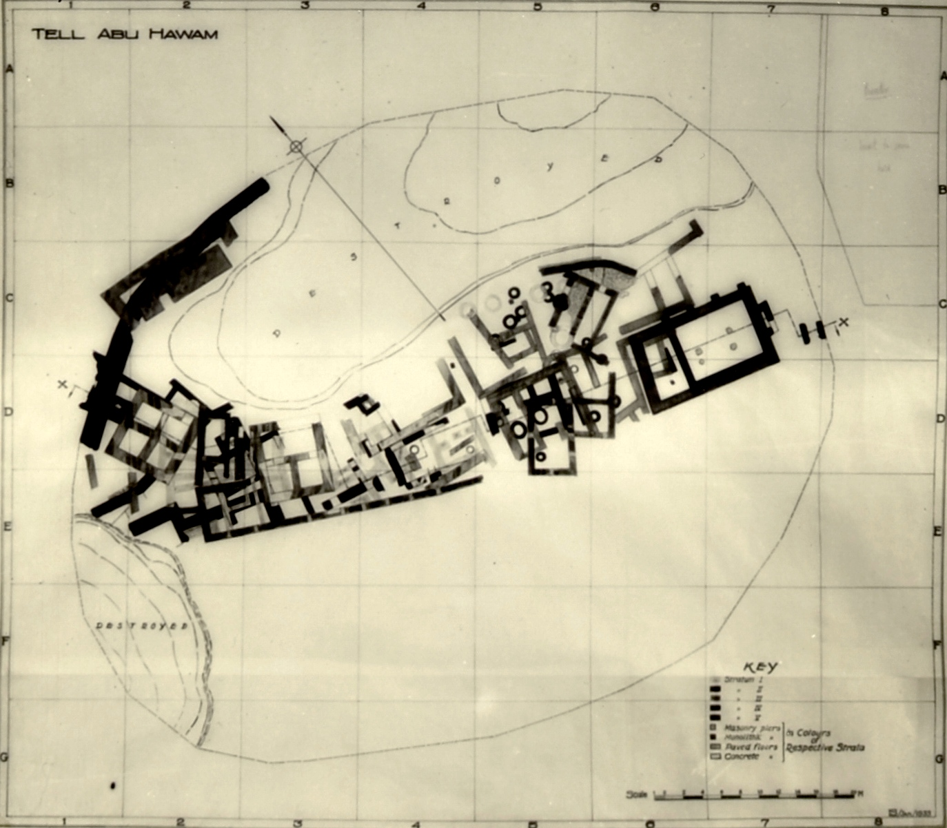 תוכניות התל בחפירות 1932 של רוברט ויליאם המילטון